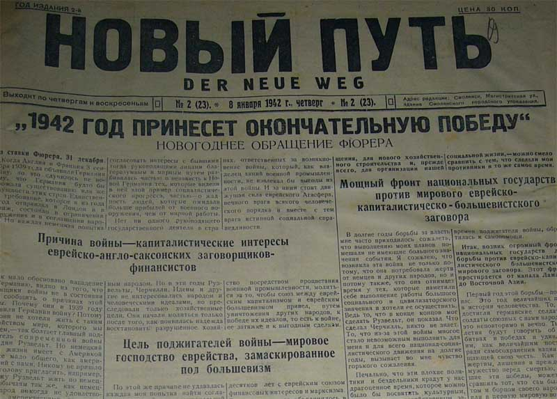 Газета «Новый путь» - многополосная оккупационная немецкая газета, выходившая с осени 1941 до осени 1943 года в Смоленской области и широко распространявшаяся по Центральной России. По тематике схожа с псковской газетой «За родину».